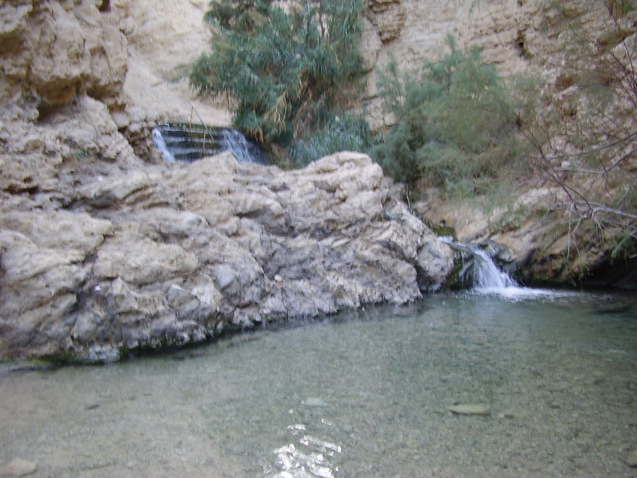 בריכה ומפלים בעין בוקק